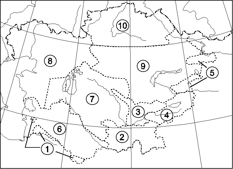 Гербарий Московского университета, районирование Средней Азии